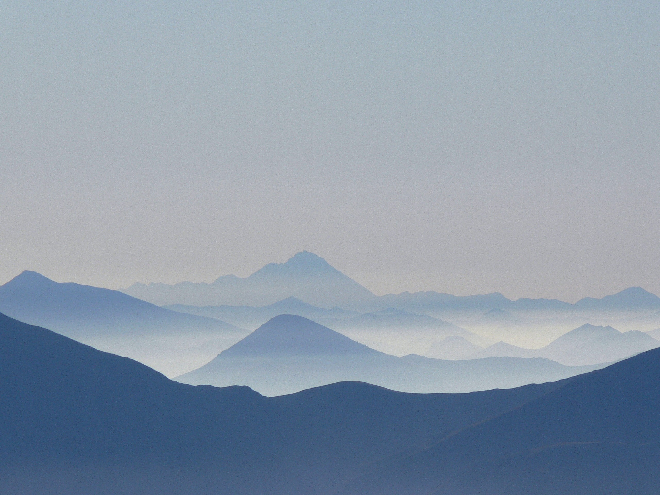 La vue étrangement scénique du Pic du Midi depuis sommet du Pic de Saint-Barthélemy (distant de 120 km environ).